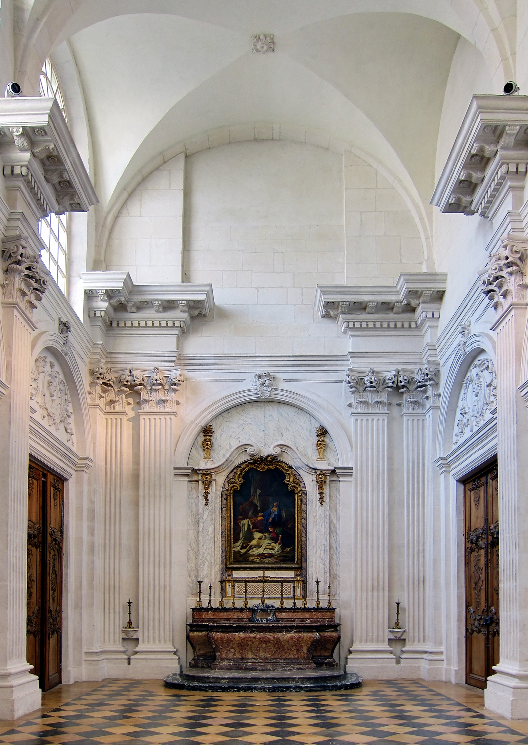 La Chapelle des élus dans le Palais des Ducs de Dijon.